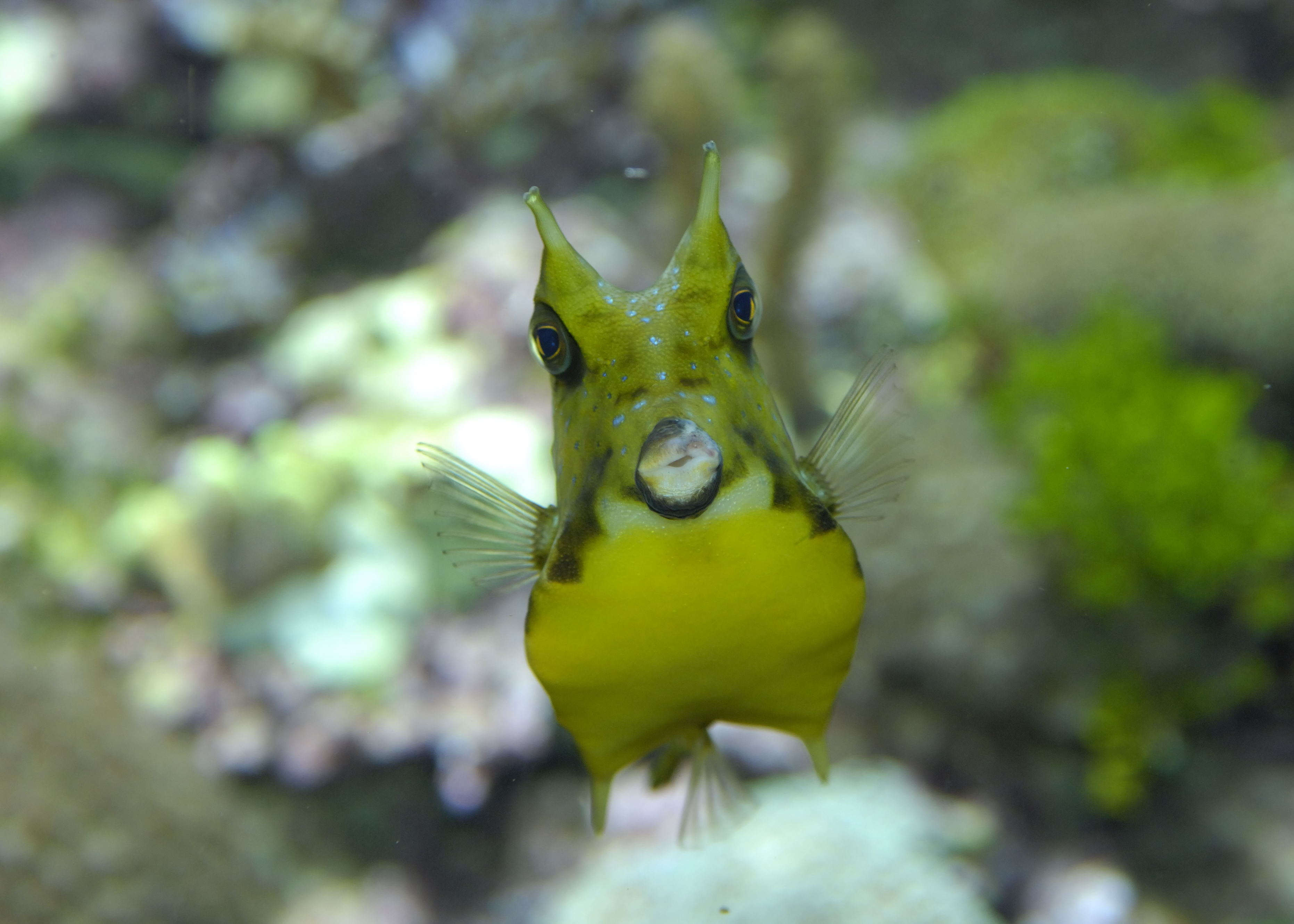 Kofferfisch - Kuhfisch (Lactoria cornuta) im Tiergarten Schönbrunn, Wien, Österreich